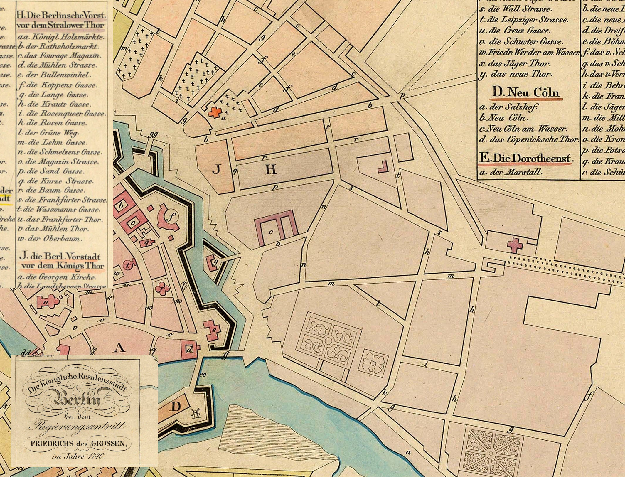 Aus dem Historischer Atlas von Berlin 1835 p6 (1740).jpg wurde die Lehmgasse (Kennzeichnung m, seit 1816: Blumenstraße) in der Stralauer Vorstadt (Kennzeichnung H) für den WP-Artikel ausgeschnitten. Die Lehmgasse wurde zur Blumenstraße in Berlin-Mitte und Berlin-Freidrichshain im dargestellten Verlauf. Im Ergebnis des Zweiten Weltkriegs wurde die Blumenstraße in den Bezirk Friedrichshain-Kreuzberg - Ortsteil Friedrichshain verkürzt.